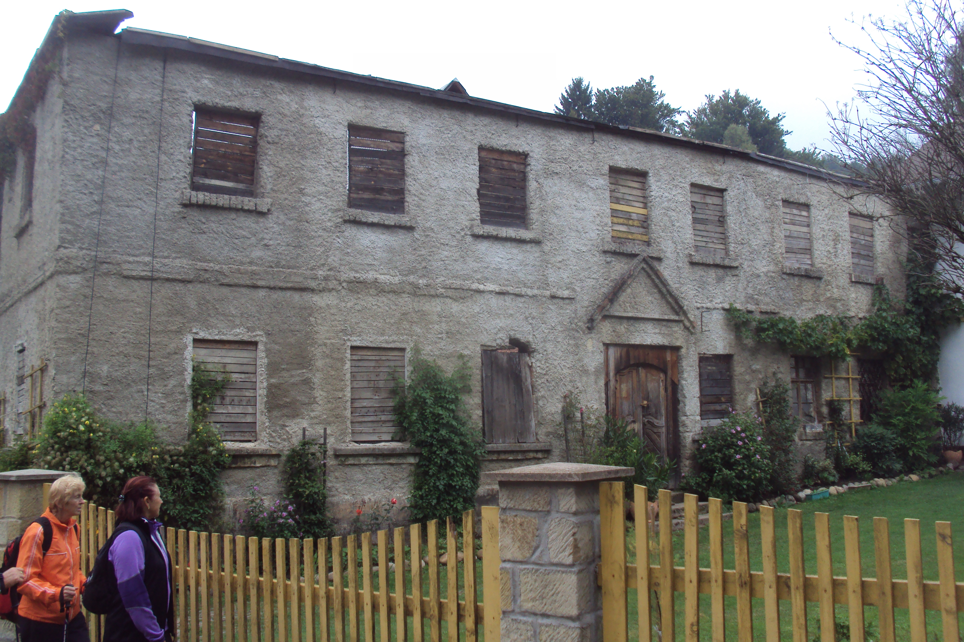 Starý mlýn v Rousínově